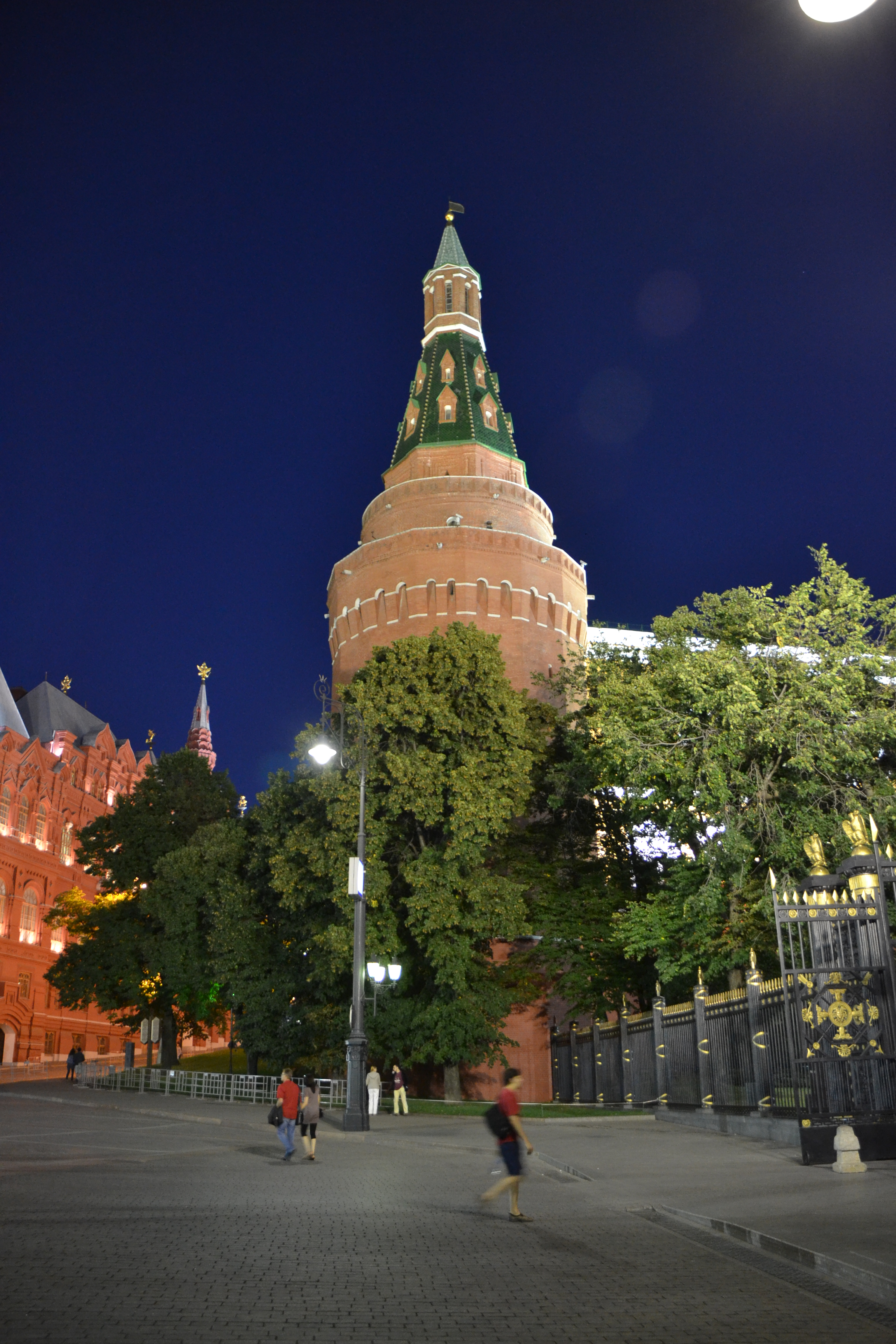 Московский Кремль (Москва и Московская область, Москва, Красная площадь, Кремлевская наб., Александровский сад)